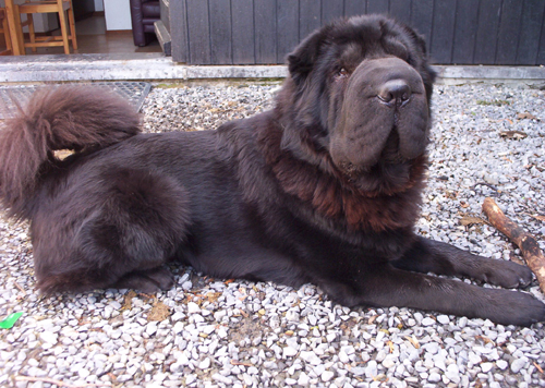 Shar Pei bearcoat, ook wellangharige Shar Pei genoemd.